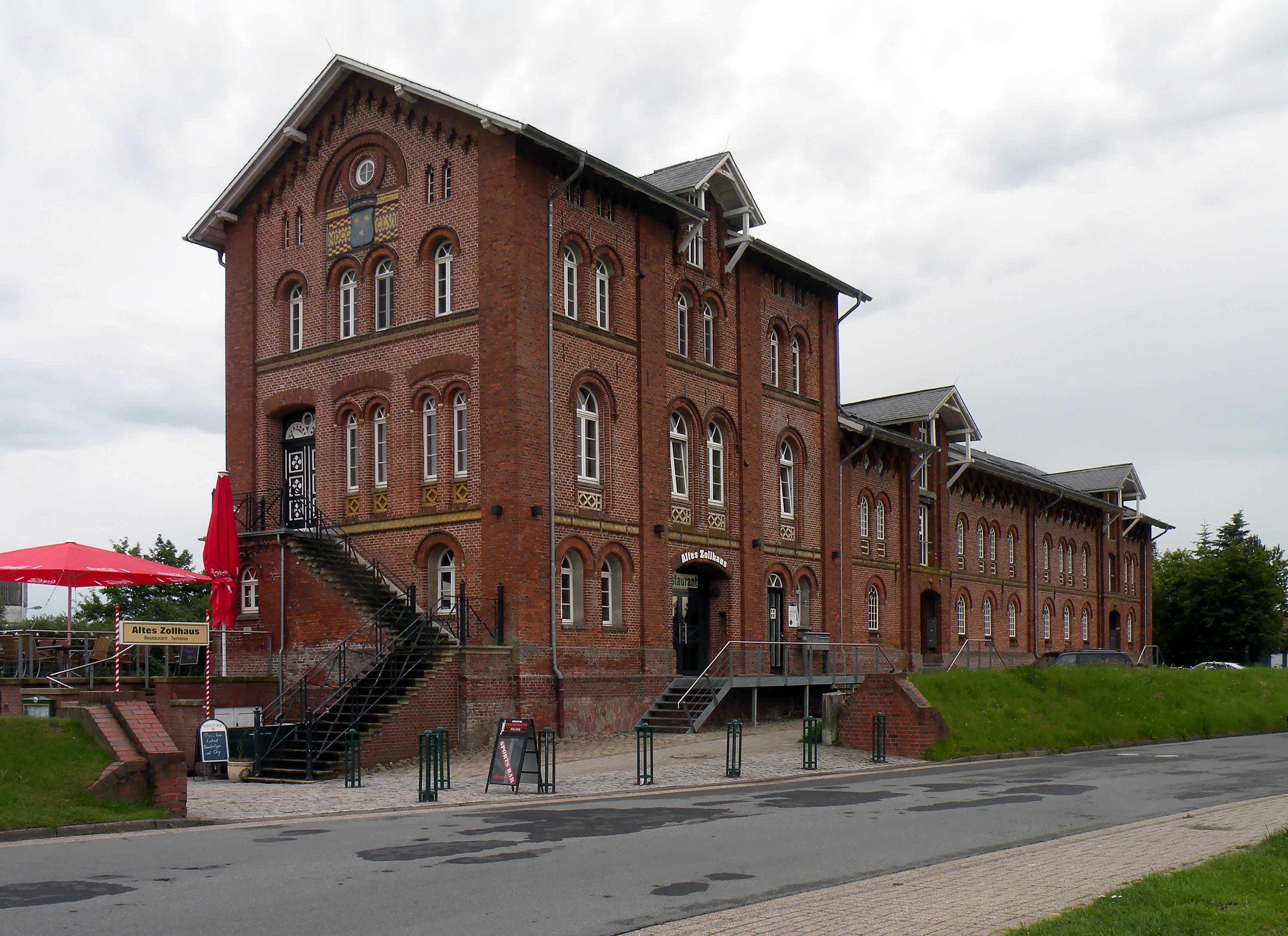 Altes Zollhaus.Norden.(Ostfriesland)